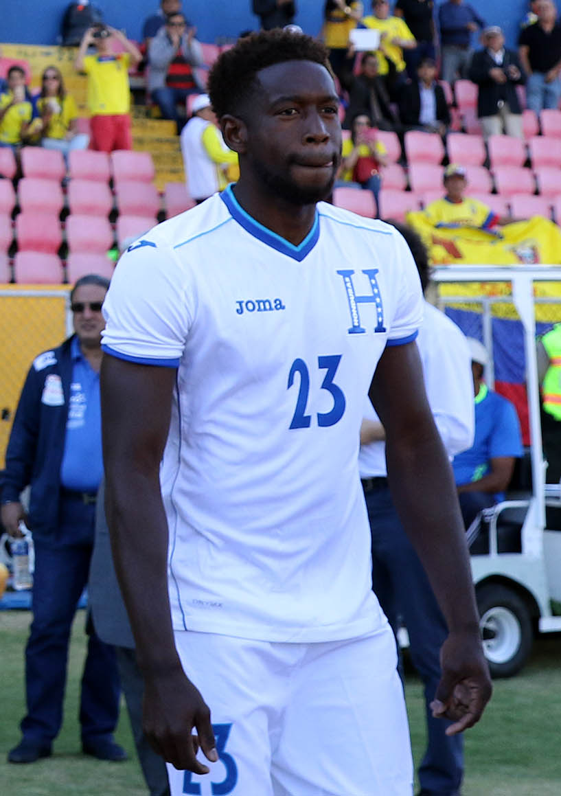 Quito, 08 de sept. (Andes).-Ecuador enfrenta a Honduras en partido amistoso jugado en el estadio Olimpico Atahualpa. Foto:César Muñoz/Andes